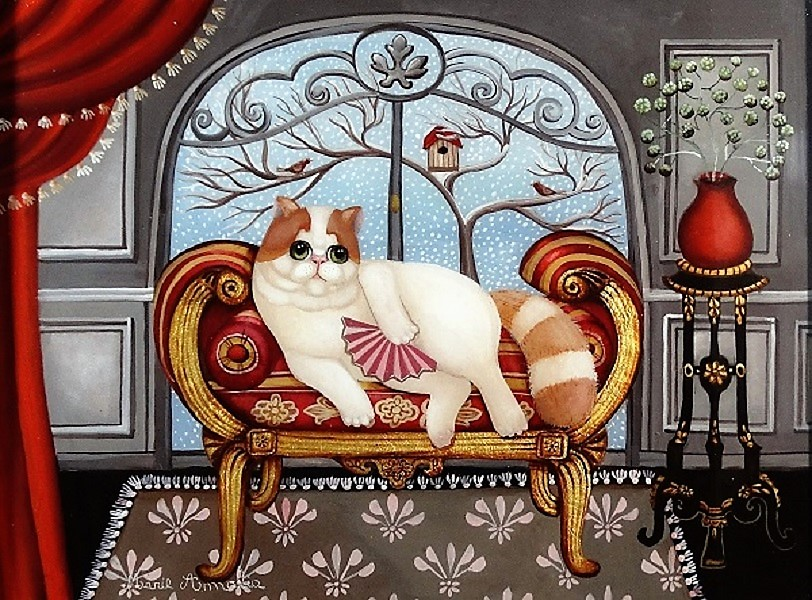 tableau